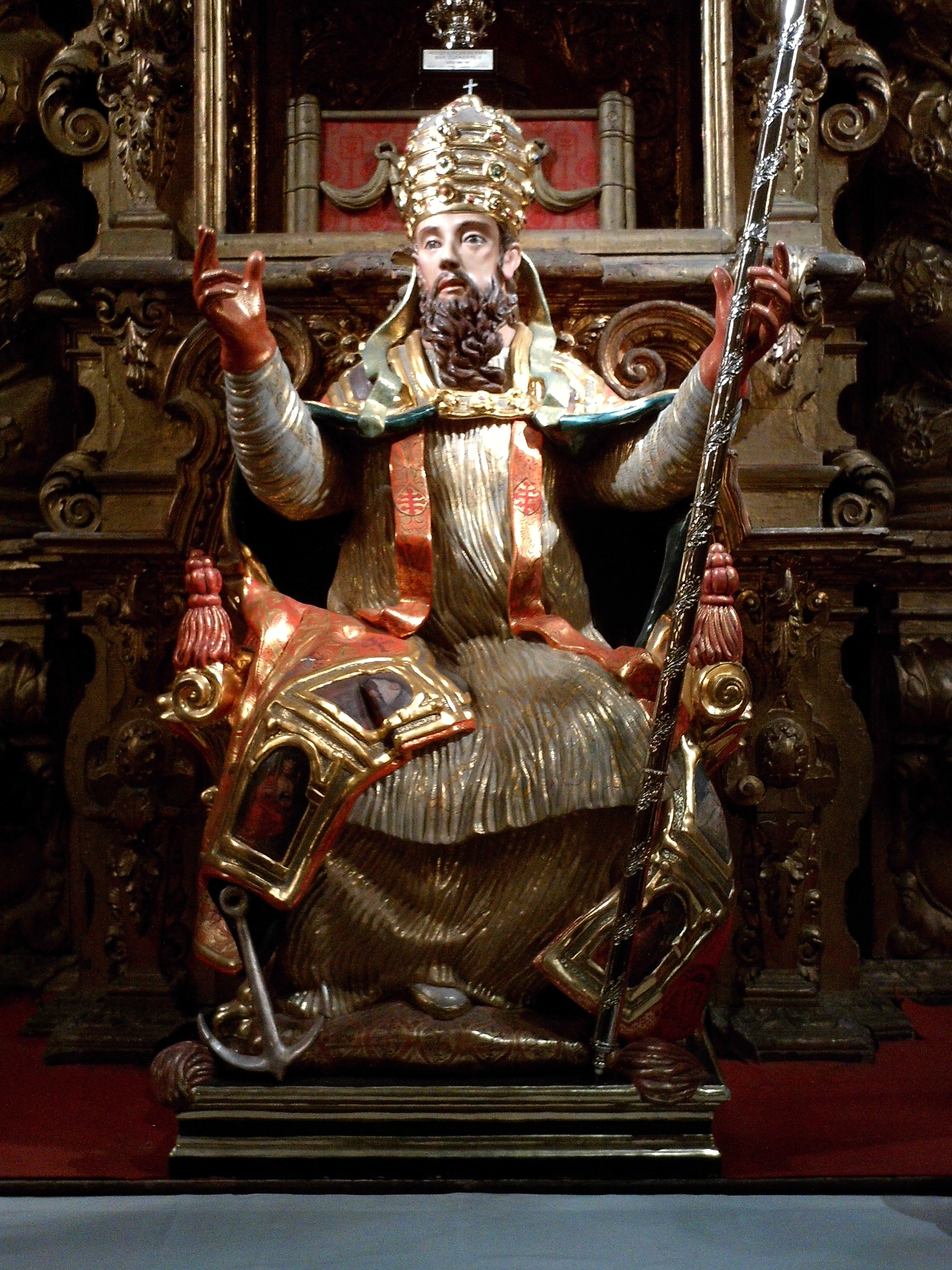 Escultura de san Clemente I. Iglesia del Sagrario, Sevilla, Andalucía, España.